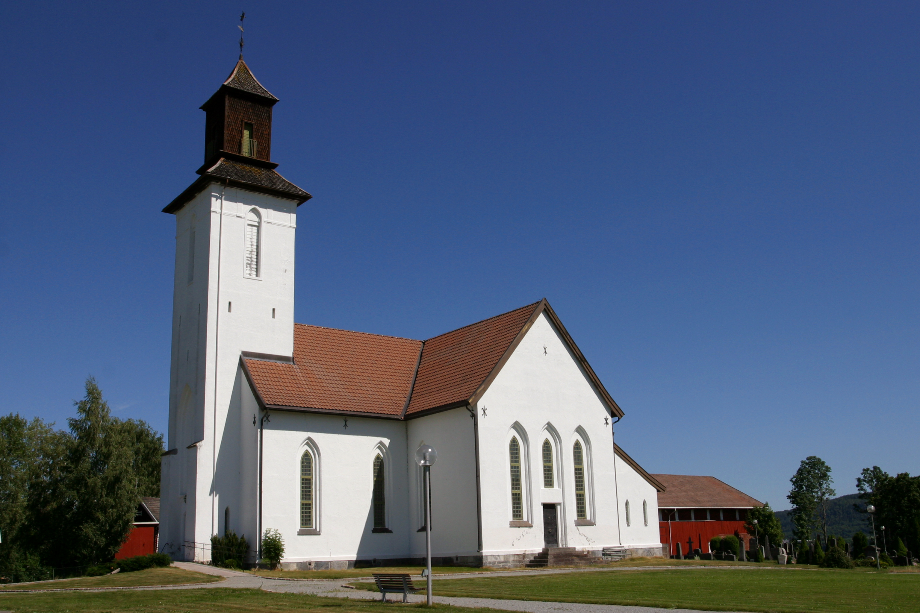 Picture of Fiskum kirke (Buskerud - Norway)